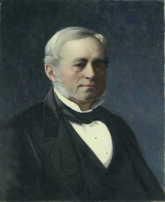 Norwegian: Otto Joachim Løvenskiold (1811-1882), norsk jurist, høyesterettsdommer, stortingsrepresentant og borgermester i Christiania (Oslo).label QS:Lno,"Otto Joachim Løvenskiold (1811-1882), norsk jurist, høyesterettsdommer, stortingsrepresentant og borgermester i Christiania (Oslo)."